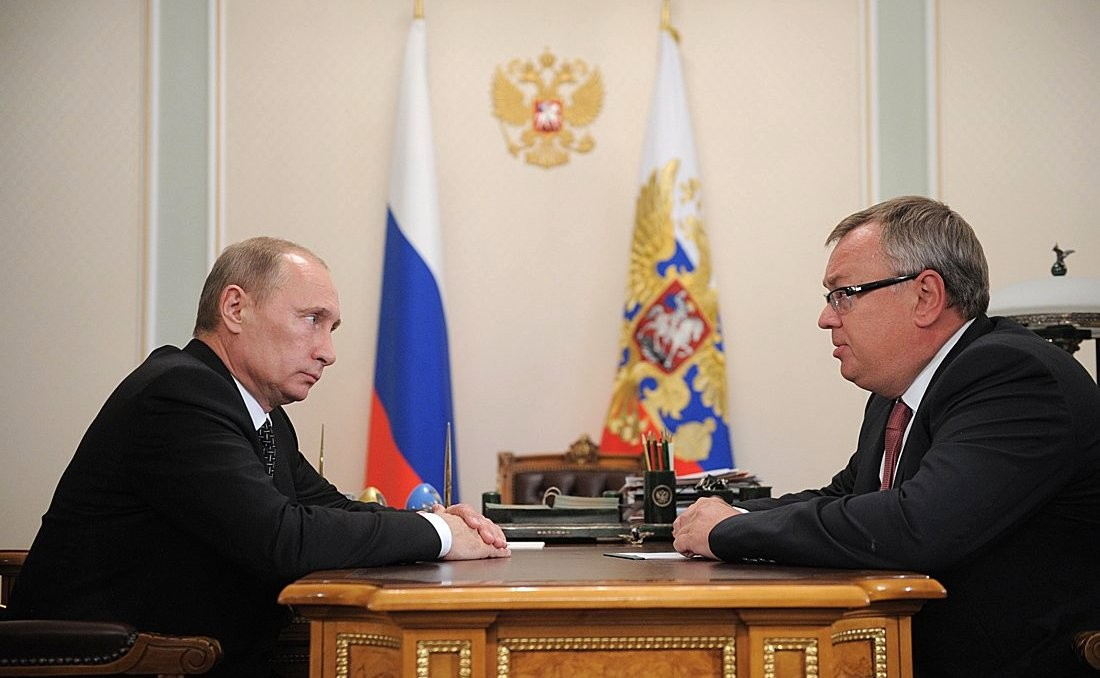 Встреча с президентом – председателем правления Банка ВТБ Андреем Костиным